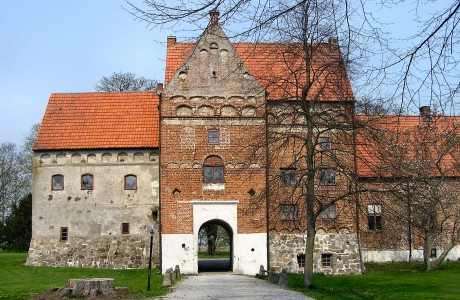 Norlindmuseet på Borgeby Slott.